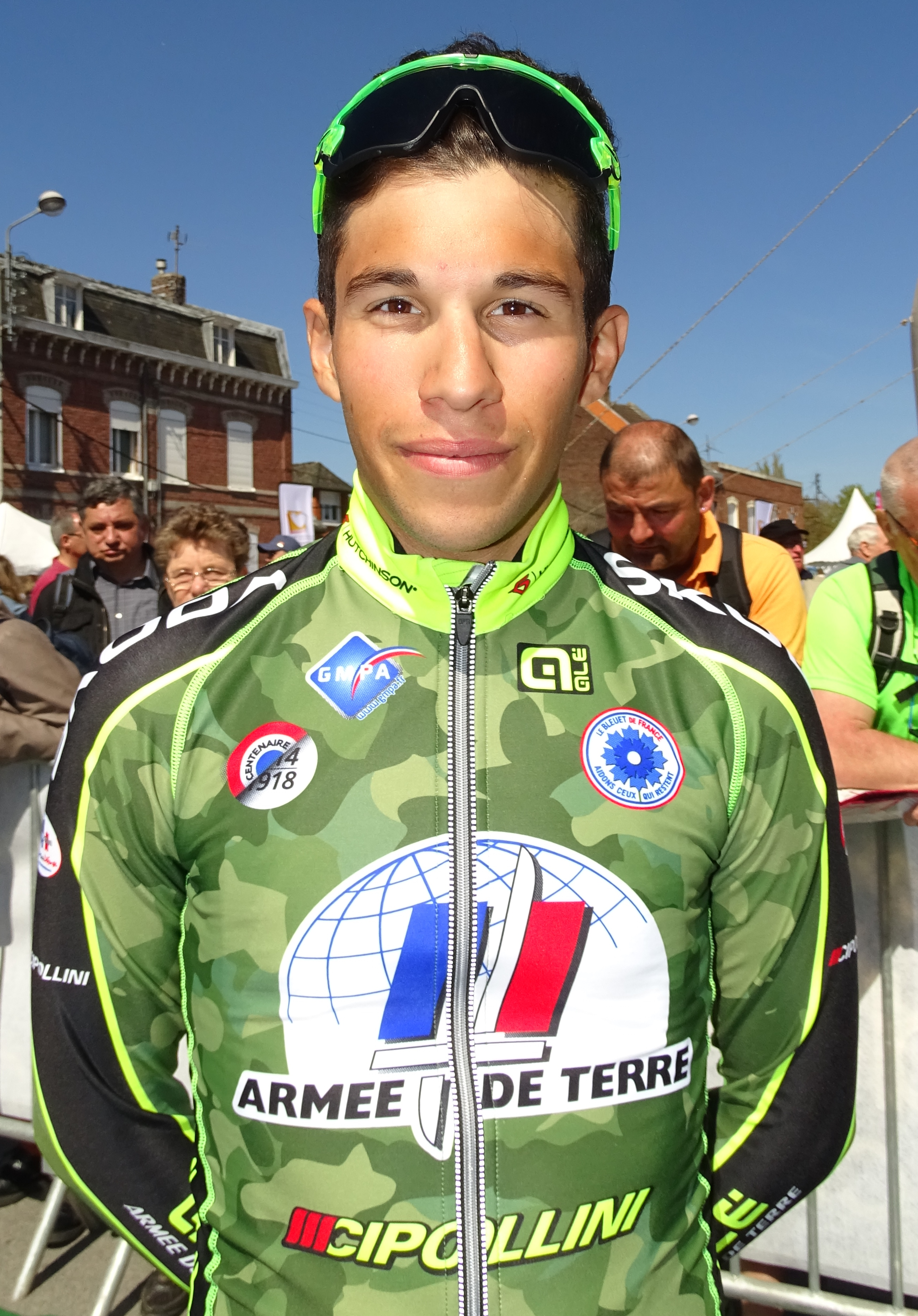 Reportage réalisé le jeudi 5 mai 2016 à l'occasion du départ et de l'arrivée de la deuxième étape des Quatre jours de Dunkerque 2016 à Aniche, Nord, Nord-Pas-de-Calais, France. Depicted person: Thibault Ferasse Depicted team: Armée de Terre